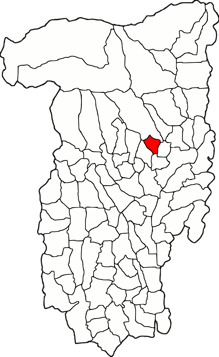 Lage der Gemeinde Păușești-Măglași im Kreis Vâlcea (RO).